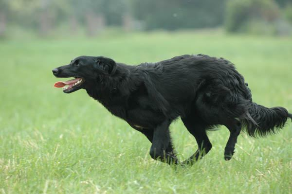 Altdeutscher Hütehund, Schwarzer